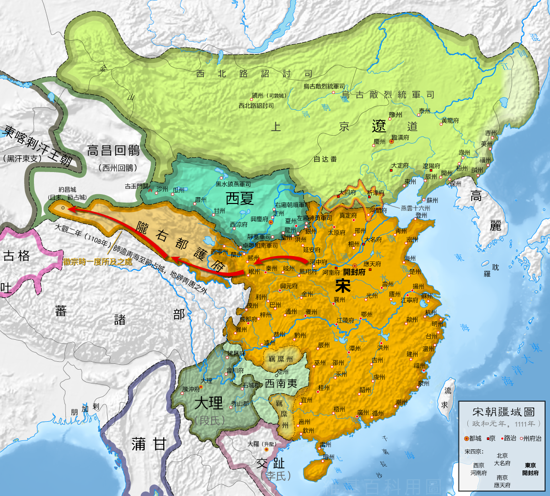 北宋疆域图